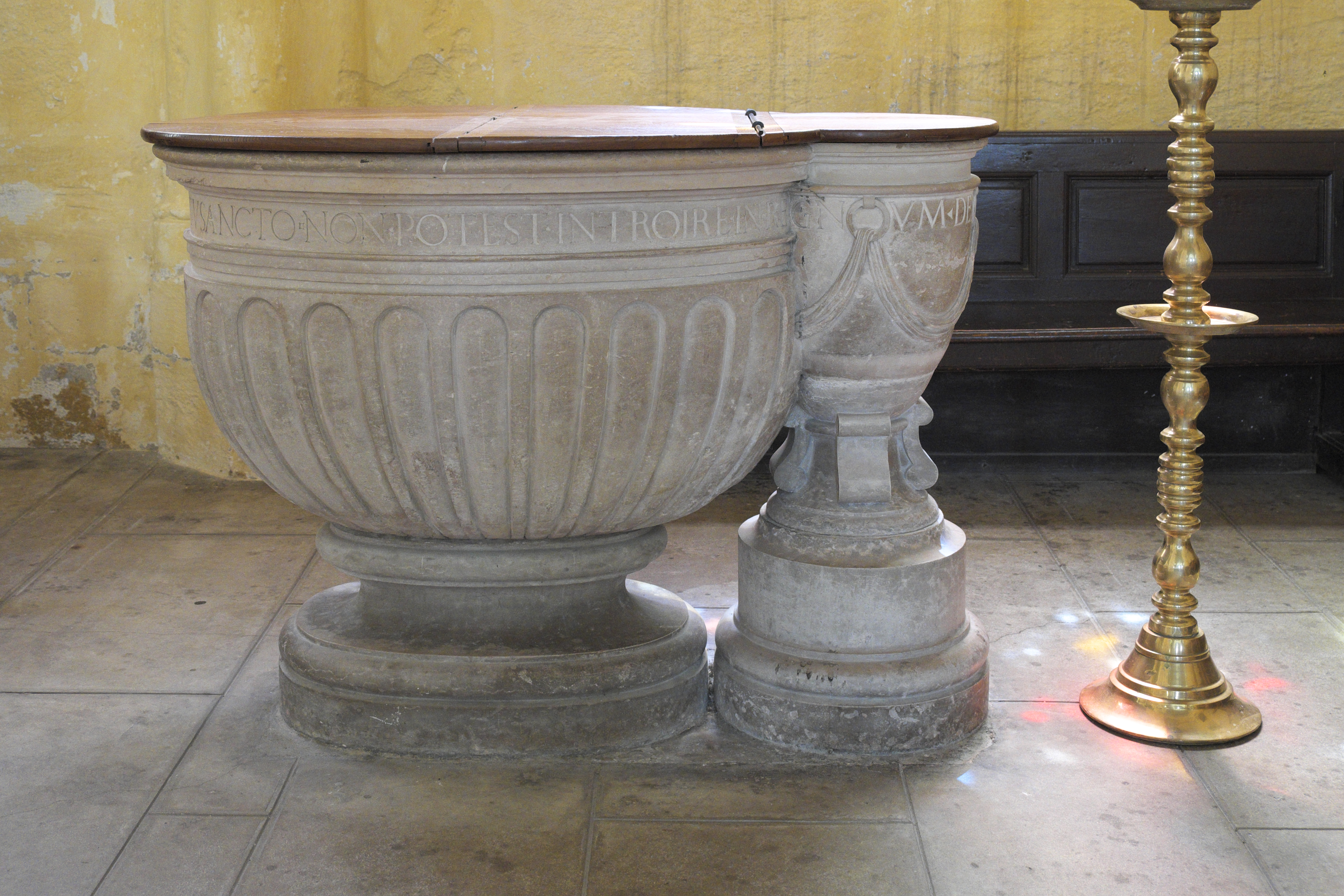 Katholische Pfarrkirche Saint-Martin in Triel-sur-Seine im Département Yvelines (Île-de-France/Frankreich), Taufbecken aus dem 18. Jahrhundert